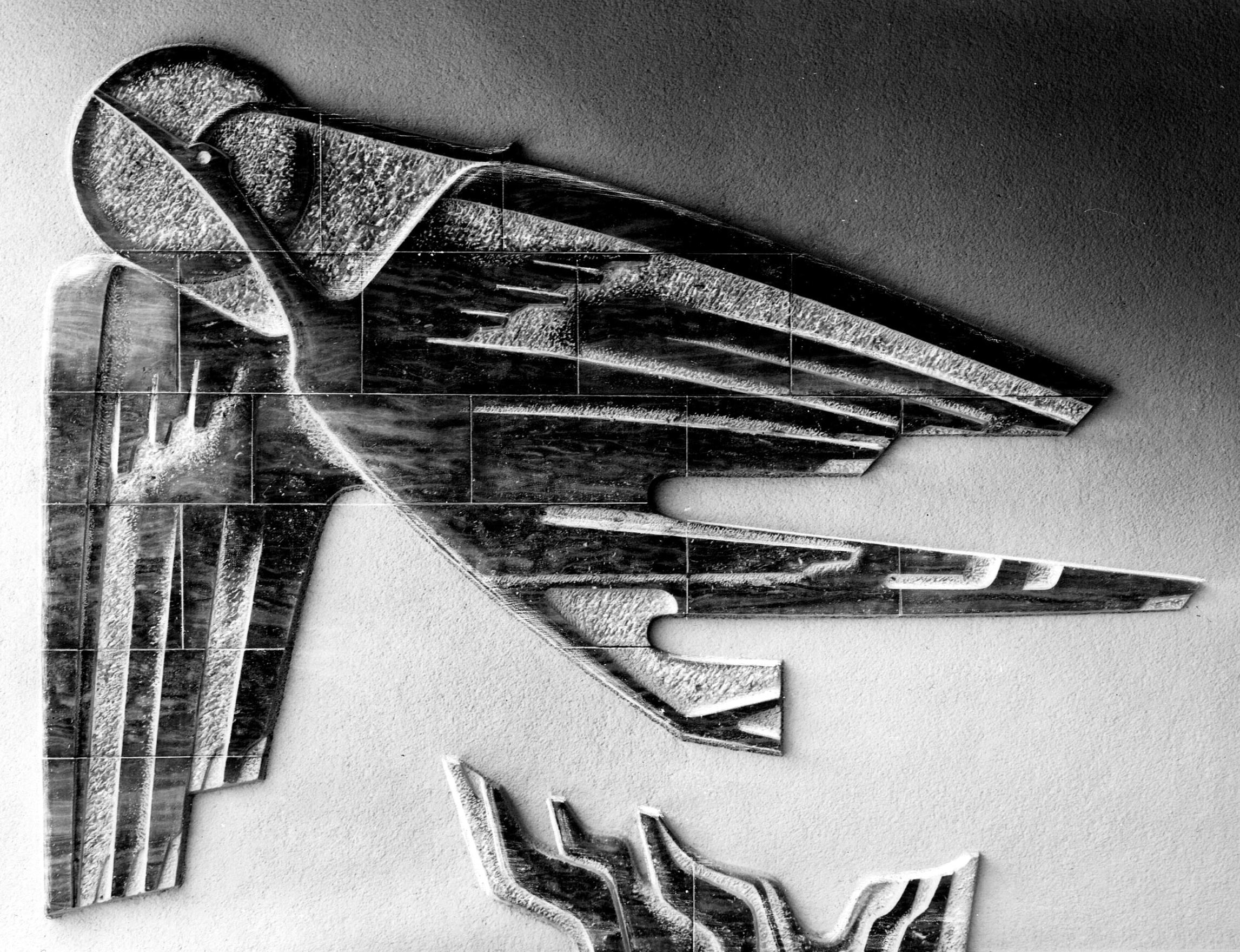 Odo Tattenpach: „Aufsteigender Phoenix“ von 1953, im Eingangsbereich des Bundeshauses in Bonn.